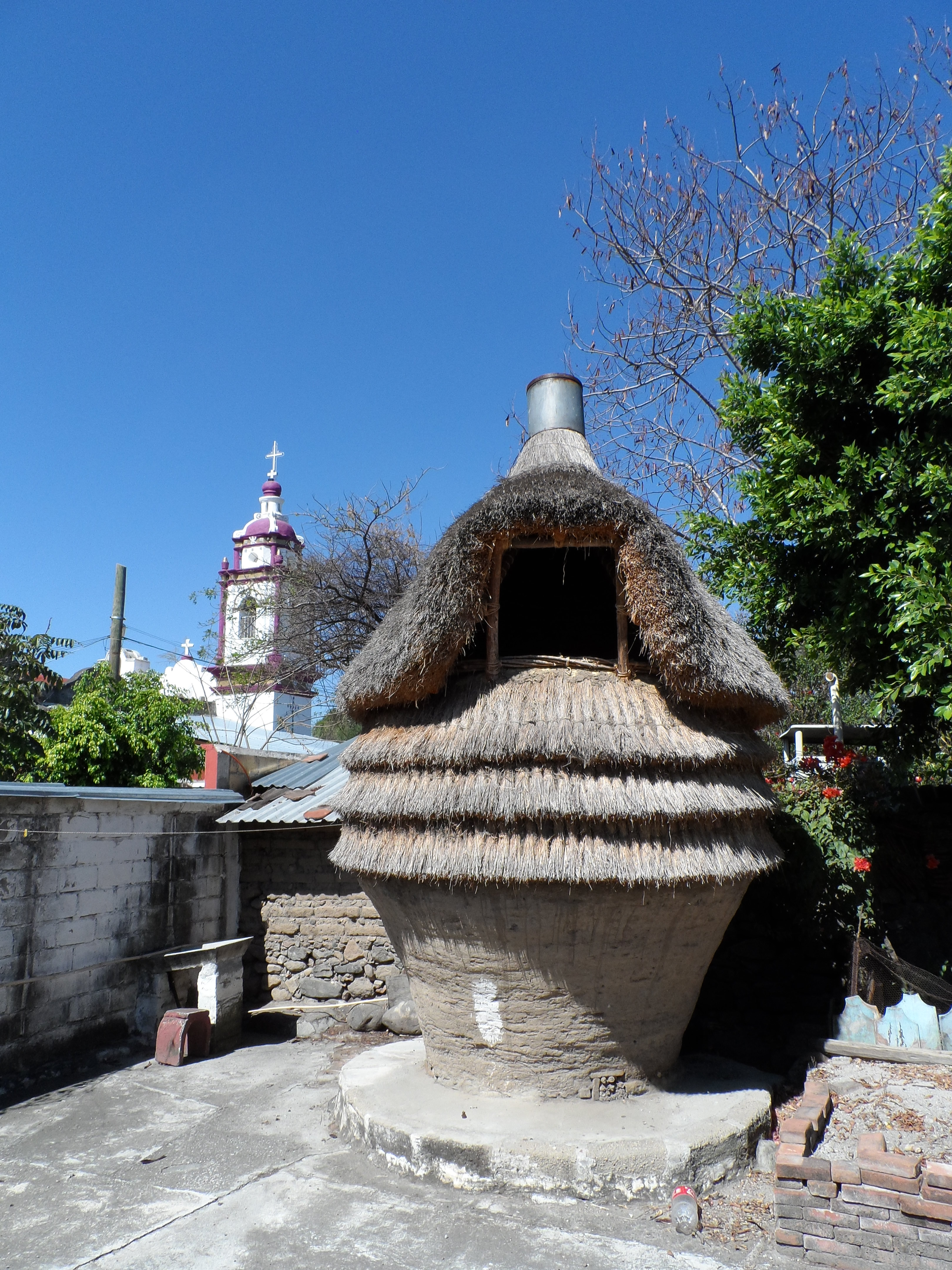 granaero prehispánico de maíz hecho a base de barro y zacate silvestre